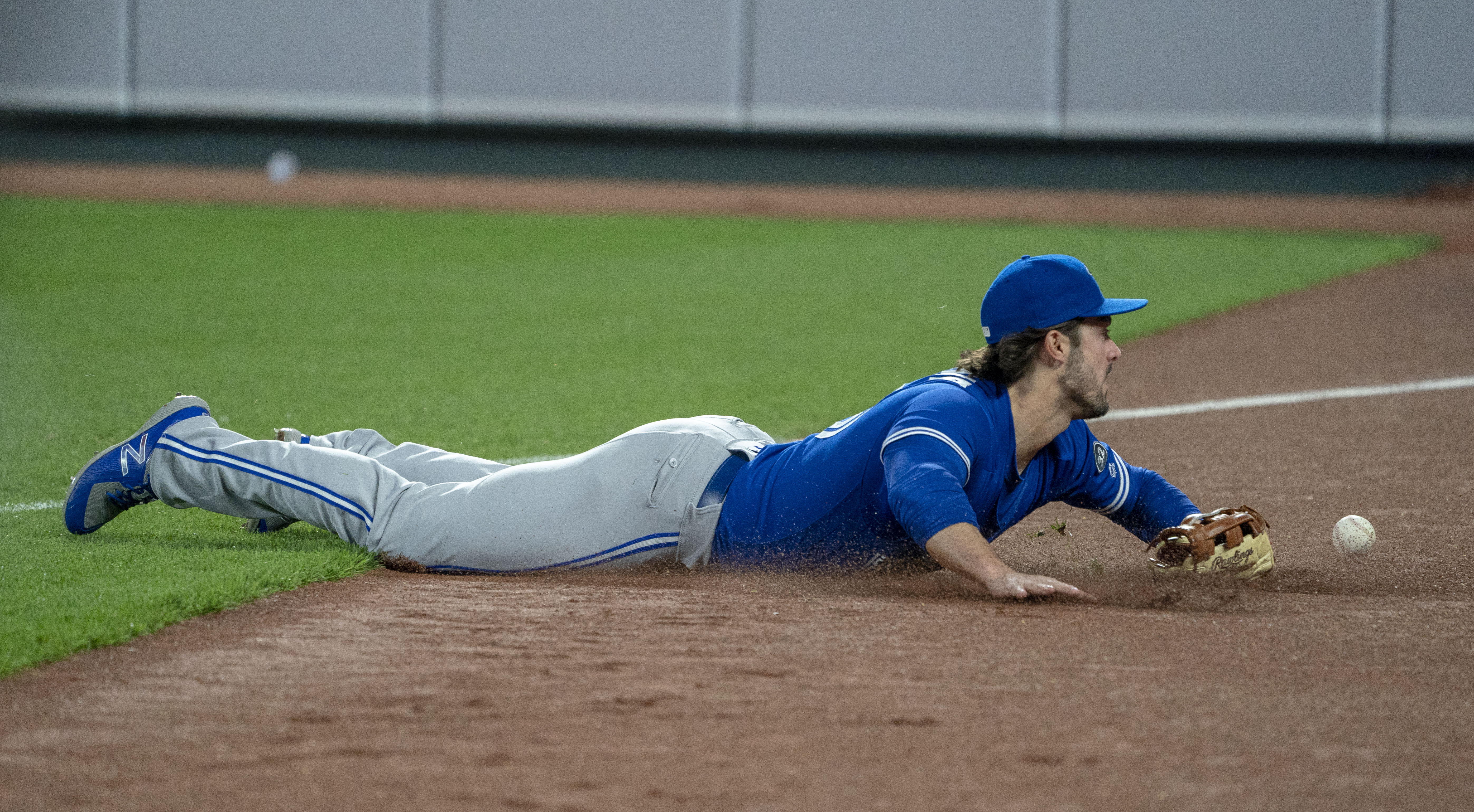 Blue Jays at Orioles 4/11/18